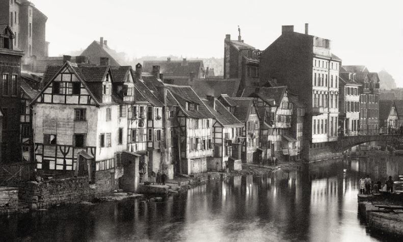 An der Fuhr, Elendsviertel der Stadt Elberfeld, 1880er Jahre